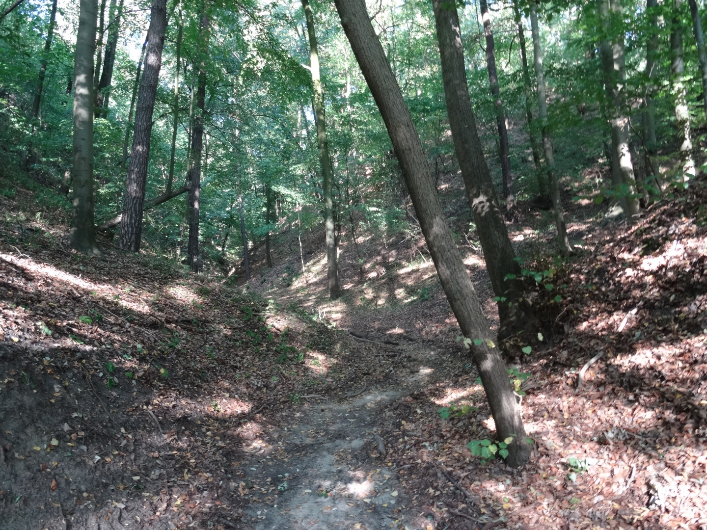 Pień, gmina Dąbrowa Chełmińska